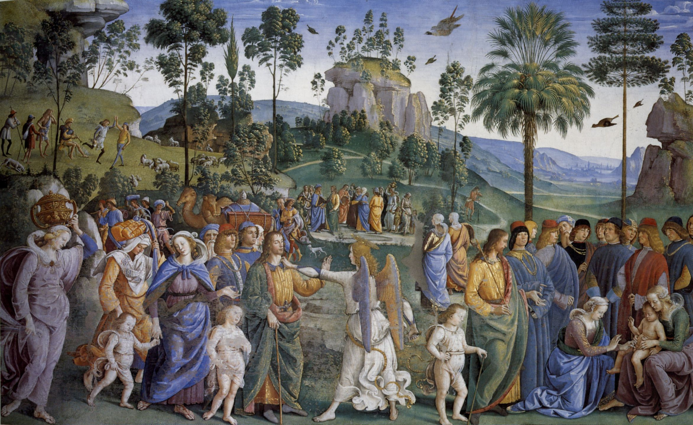 Cappella Sistina (Viaggio di Mosè e circoncisione del suo secondo figlio).